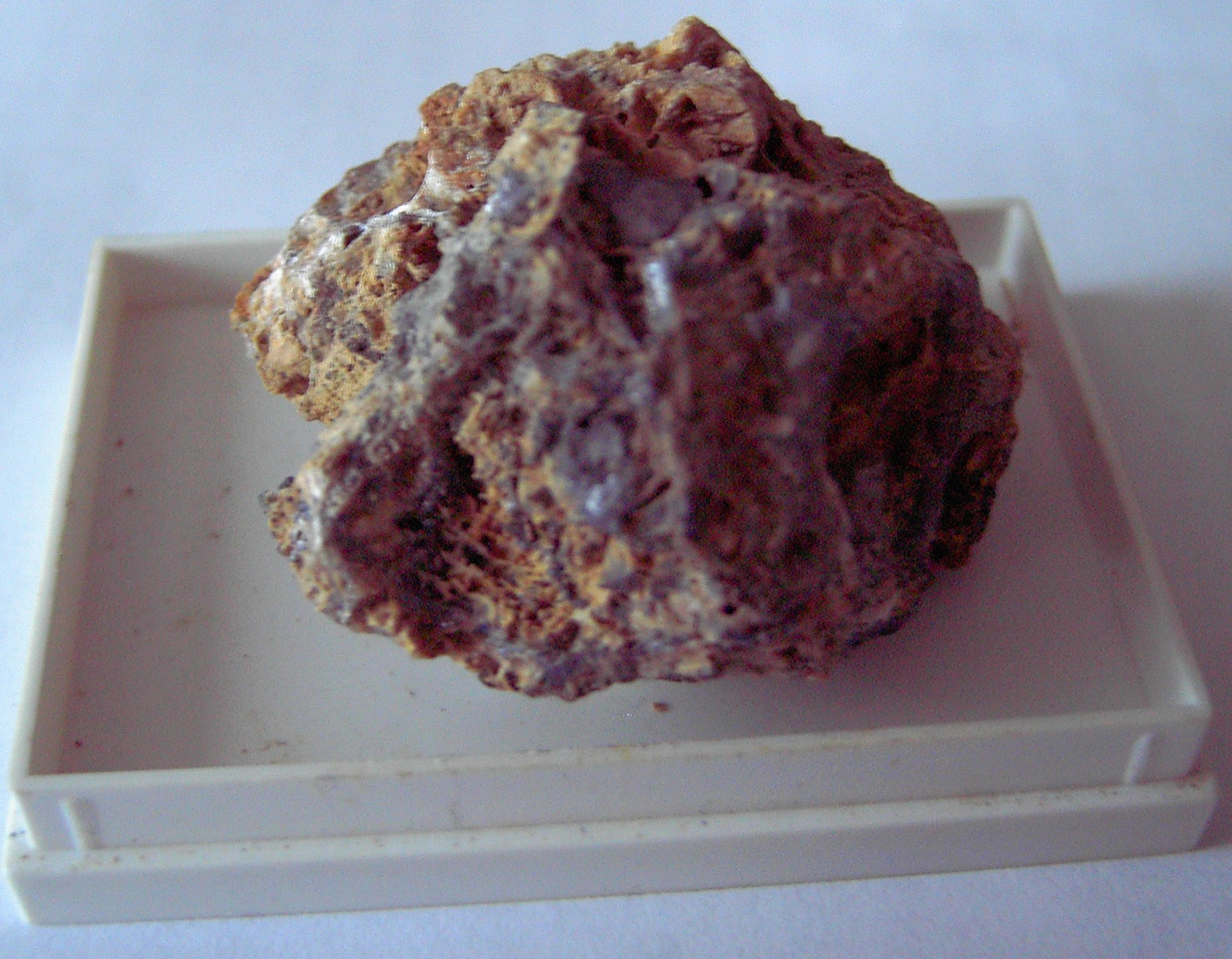 Eine Probe devonischen Kalksteins mit Galmei (Zinkerz) aus Stolberg im Rheinland